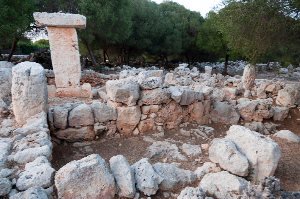 Binissafullet Nou (Sant Lluís)